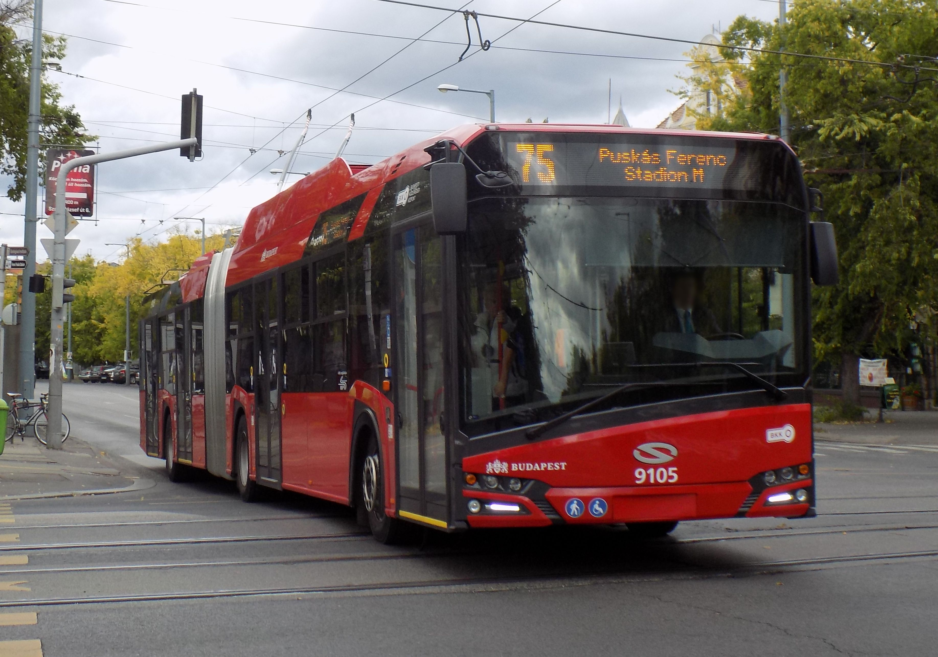 75-ös jelzésű 4. generációs Solaris Trollino 18 trolibusz a Stefánia út és a Thököly út kereszteződésében (psz. 9105)